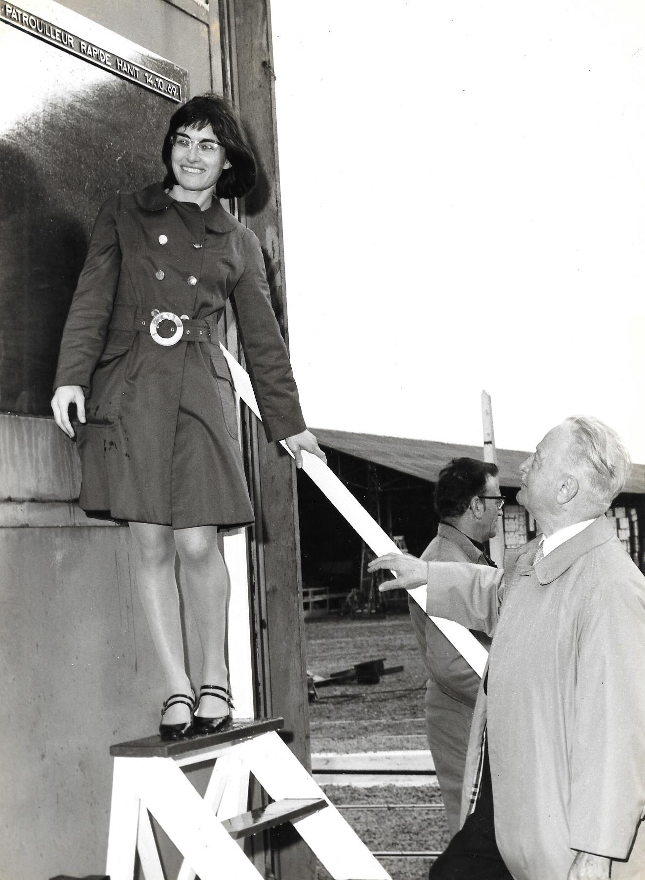 בעל מספנות שרבורג פליקס אמיו ובתו מרי-קריסטין בהשקת אח"י חנית